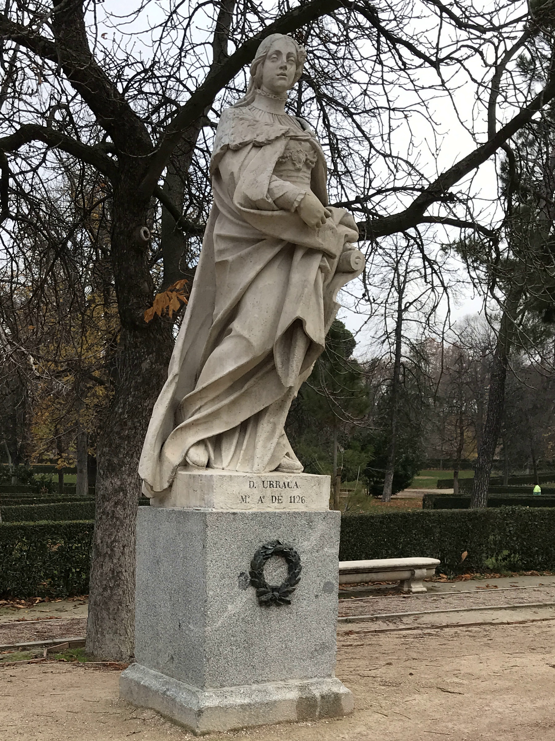 Urraca Königin von León, Statue im Retiro-Park in Madrid.